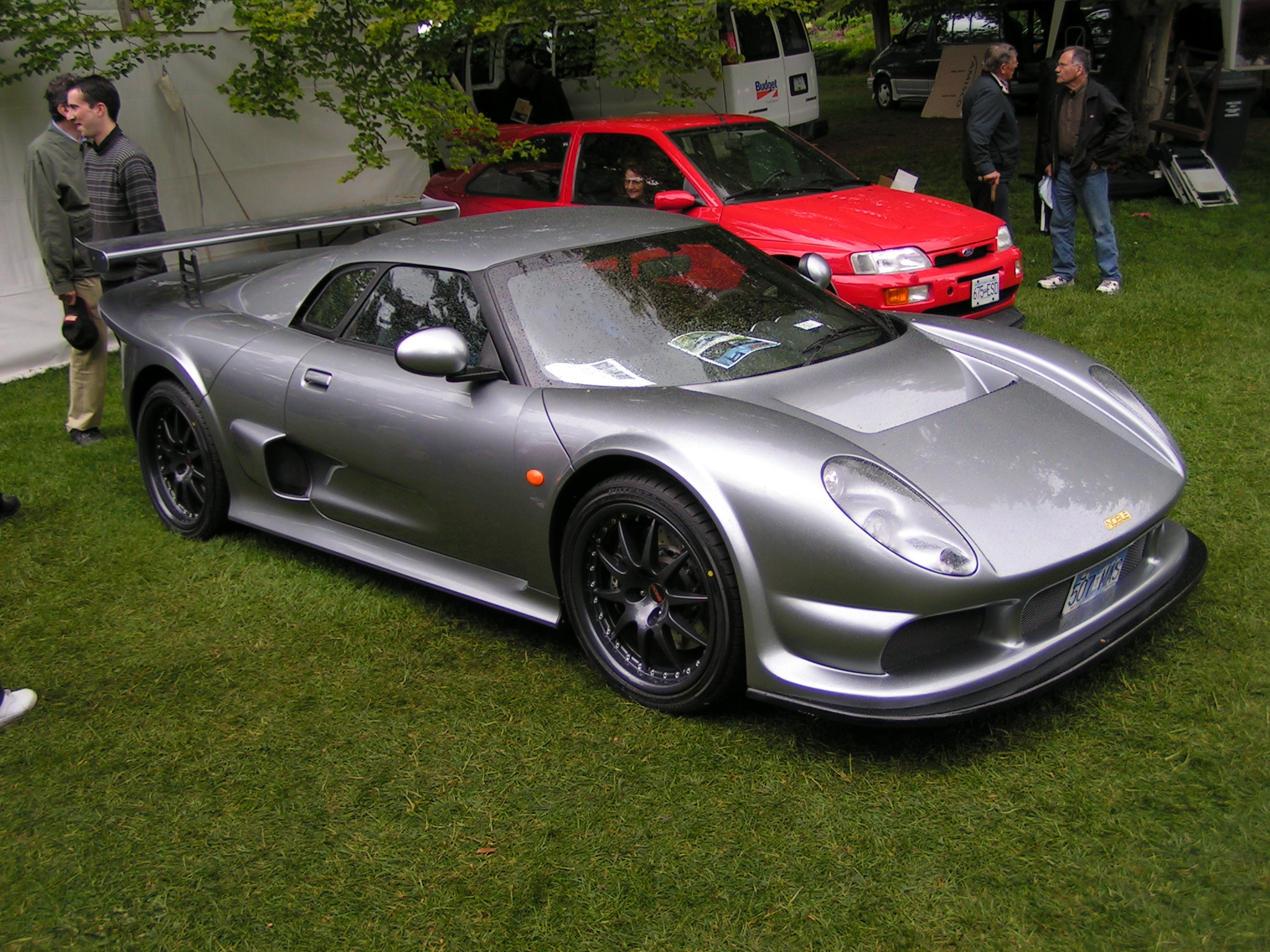 NobleNoble